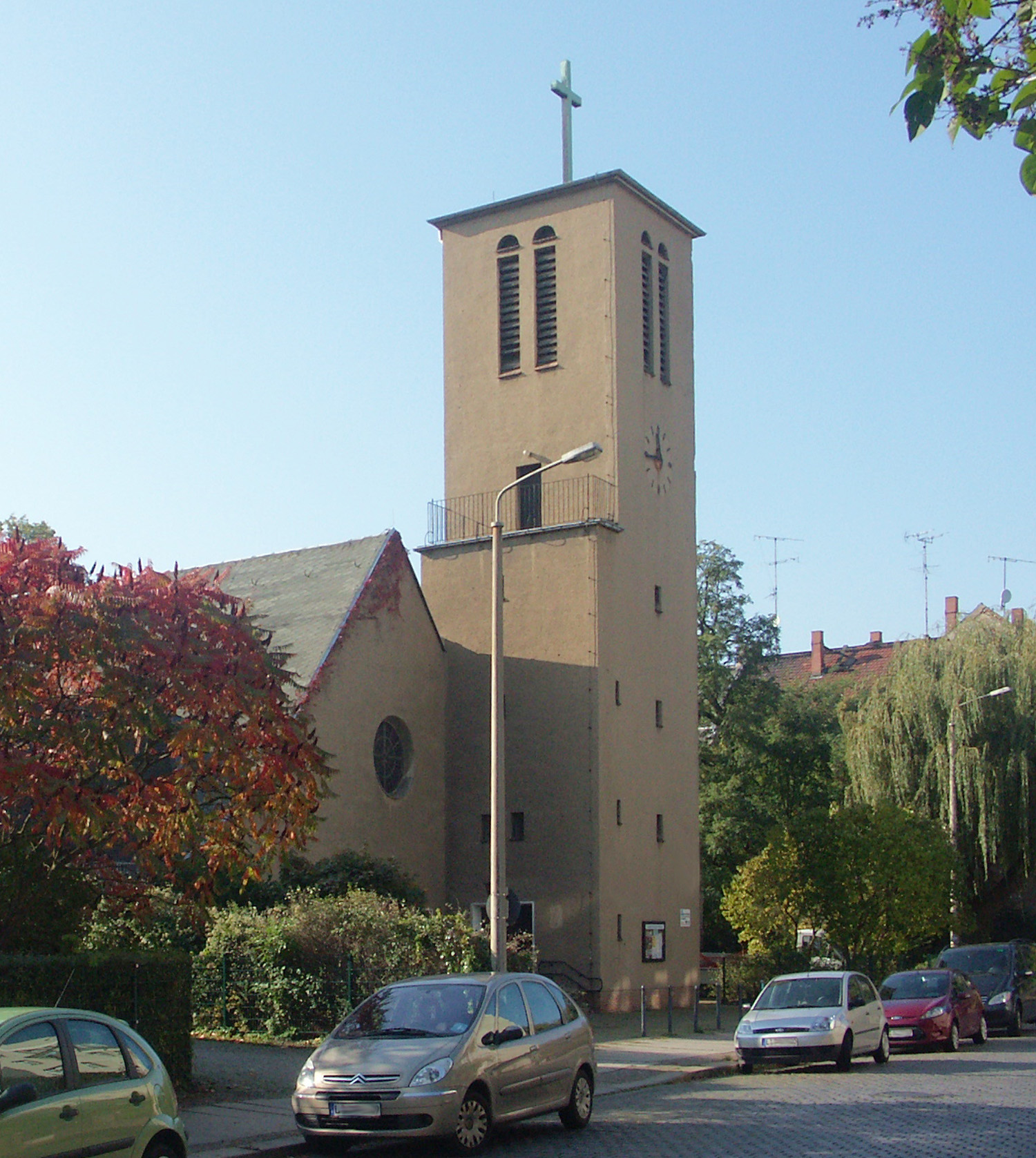 Die Trinitatis-Kirche in Leipzig-Anger-Crottendorf